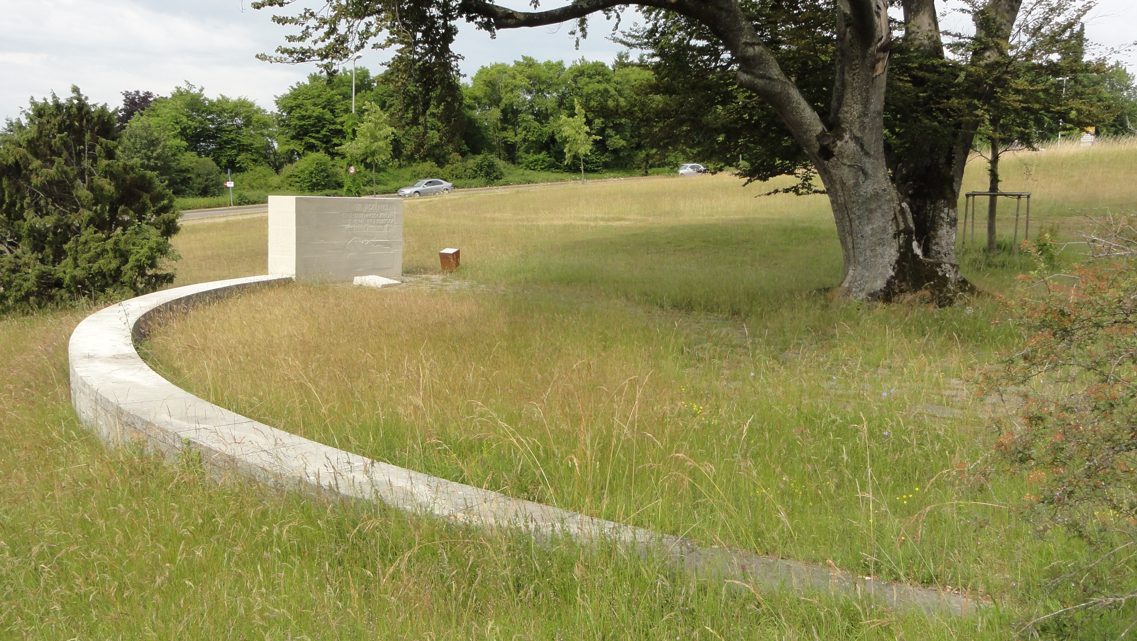 Der niedrige Mauerbogen, der vom großen Gedenkstein wegführt